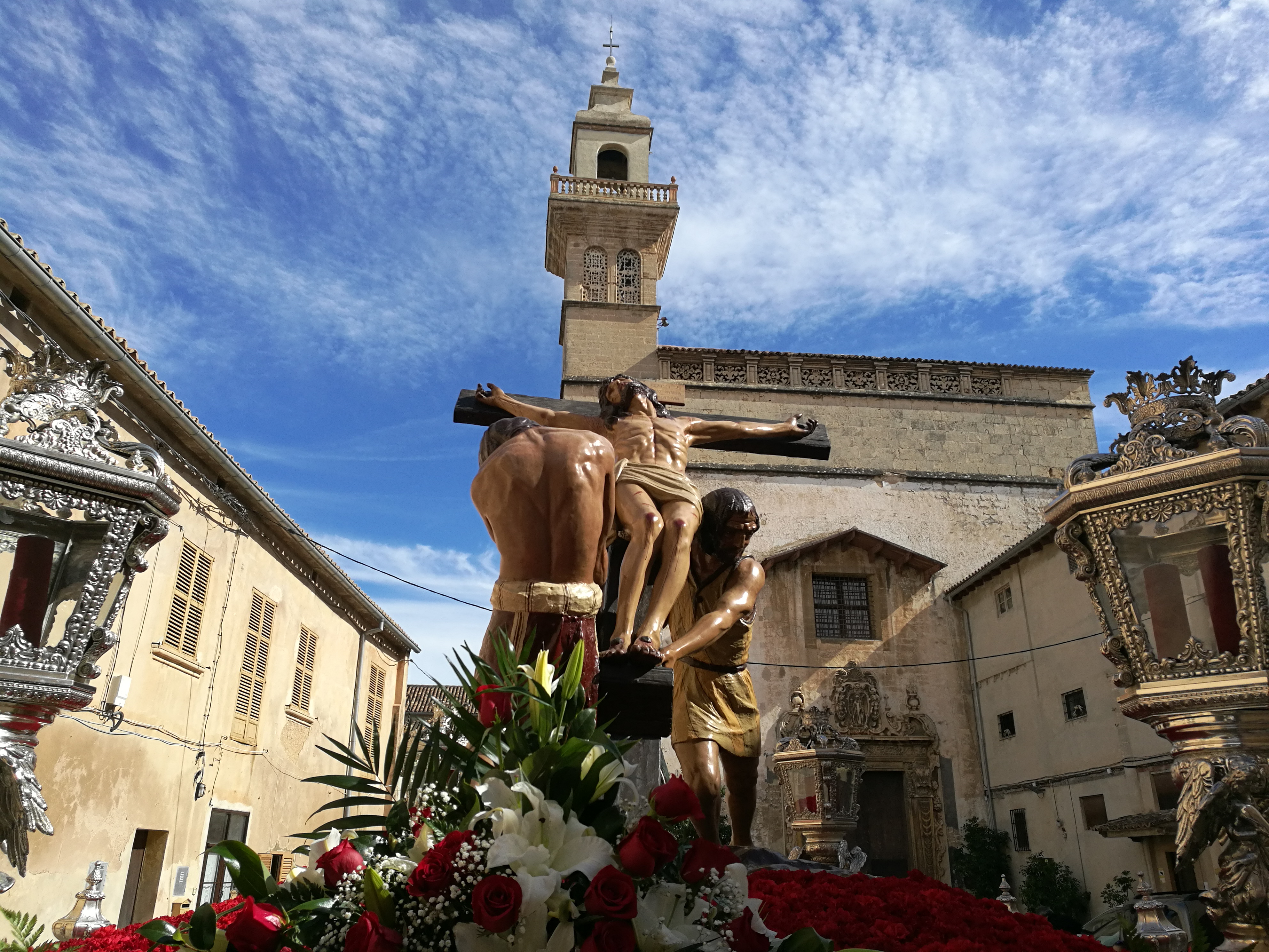 Couvent de Santa Clara, Palma, Mayorque, îles Baléares. Processions de Pâques 2018.